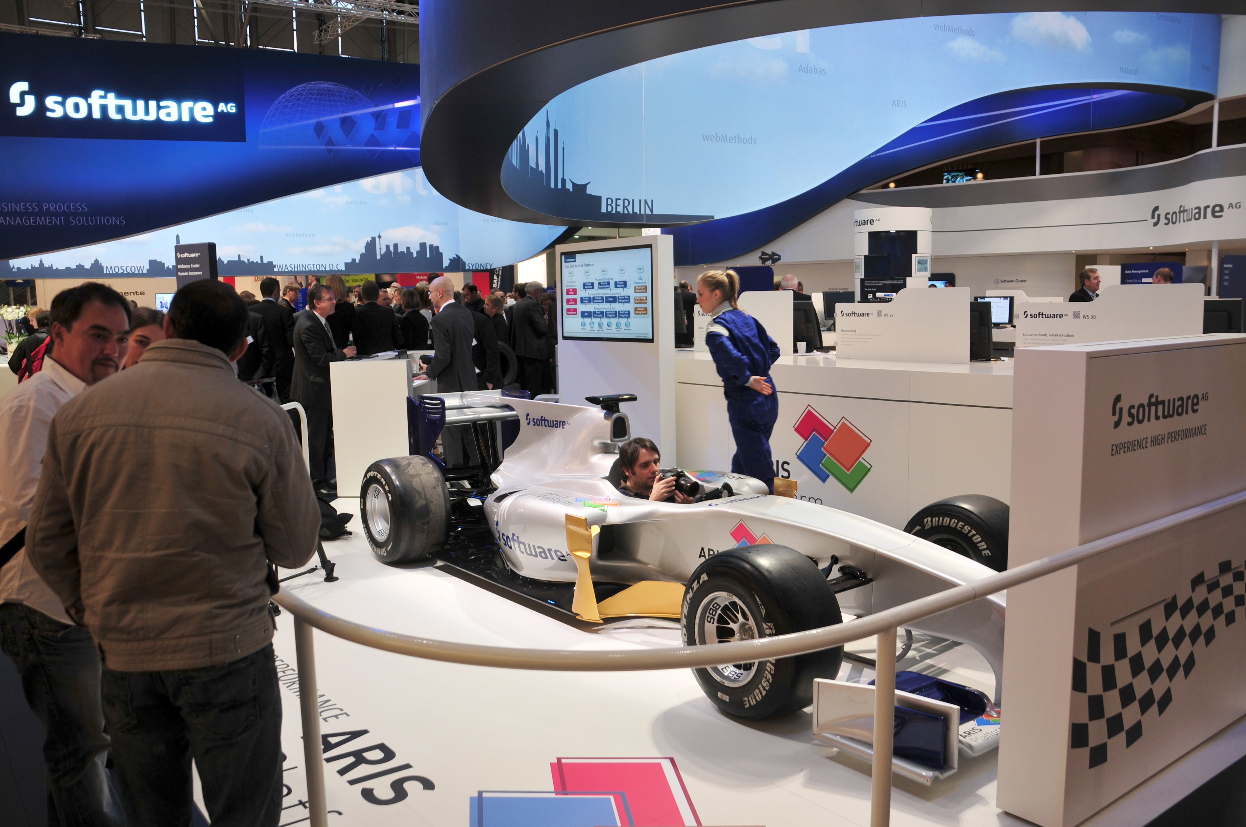 Impressionen von der CeBIT 2012 CeBIT 2012 6. bis 11. März in Hannover Dieses Foto wurde durch die Unterstützung von Wikimedia Österreich und die Twoonix Software GmbH ermöglicht.